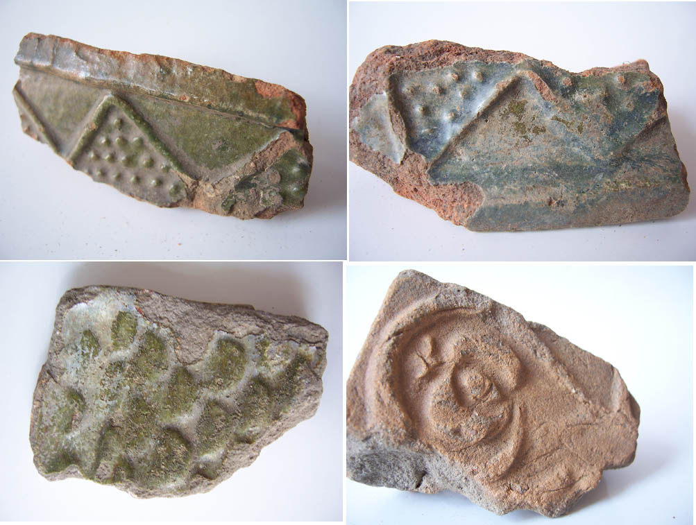 Fragmenty kafli (XVII wiek) pochodzące z dworu średniozamożnej podlaskiej szlachty.